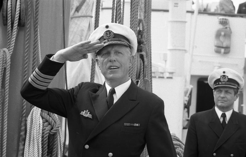 Das Segelschulschiff der Bundesmarine "Gorch Fock" verlässt zur 48/49 Auslandsausbildung den Kieler Hafen